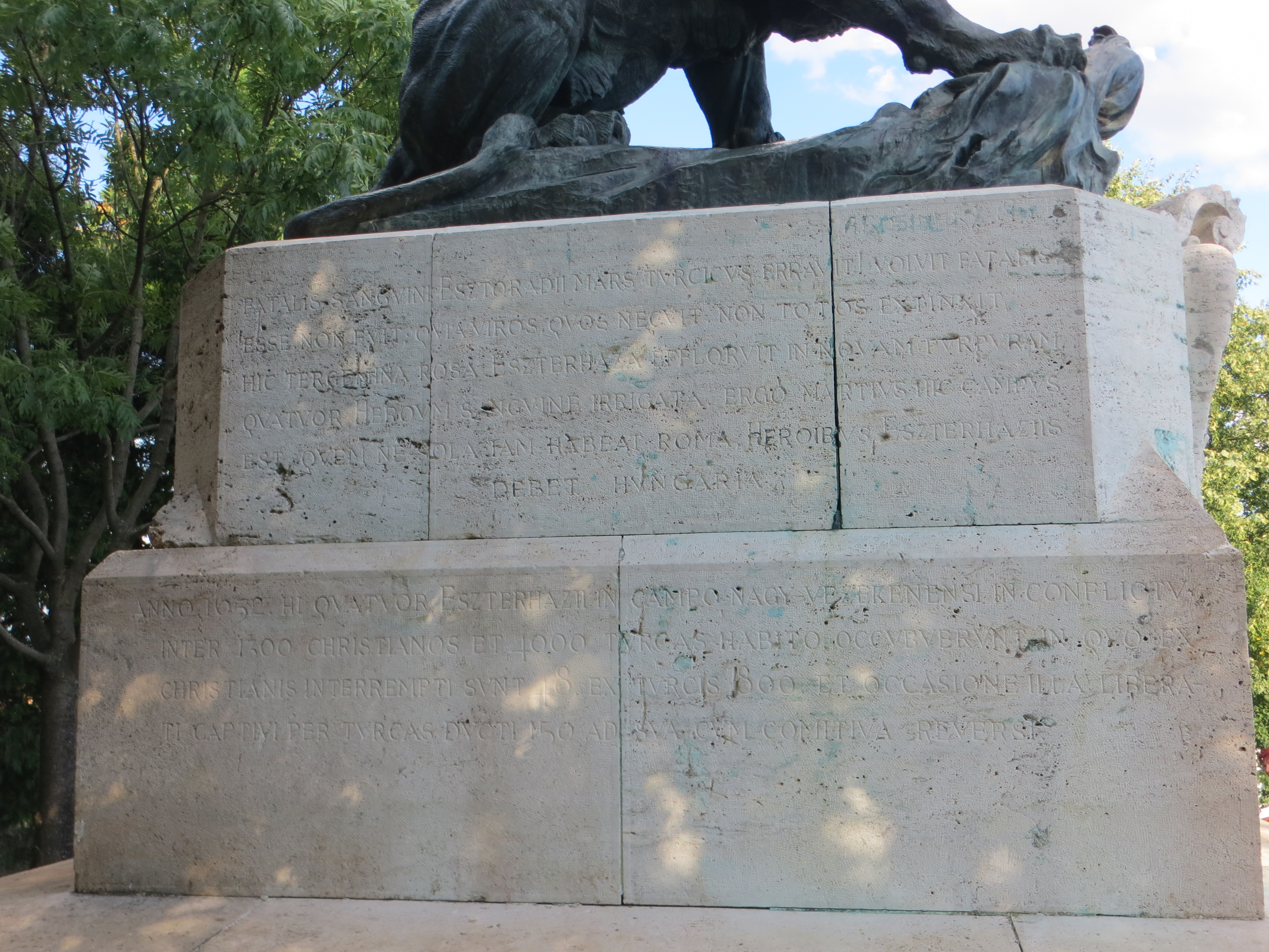 Az emlékmű jobb oldalán lévő felirat.